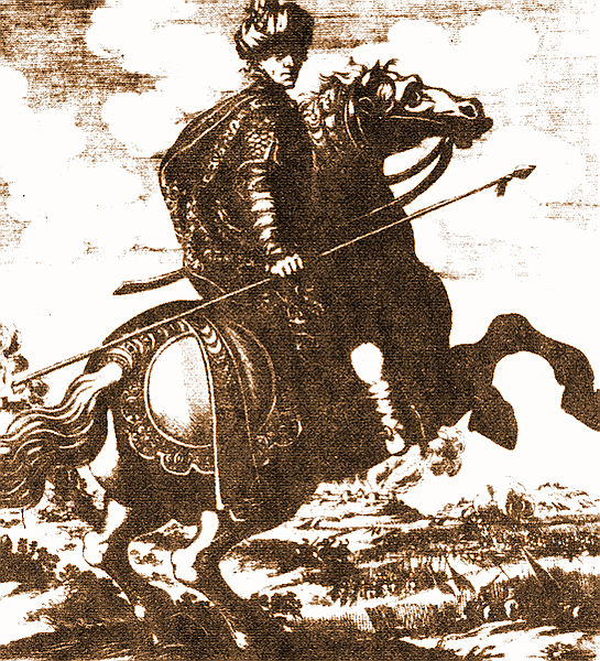 Іслам-Гірей